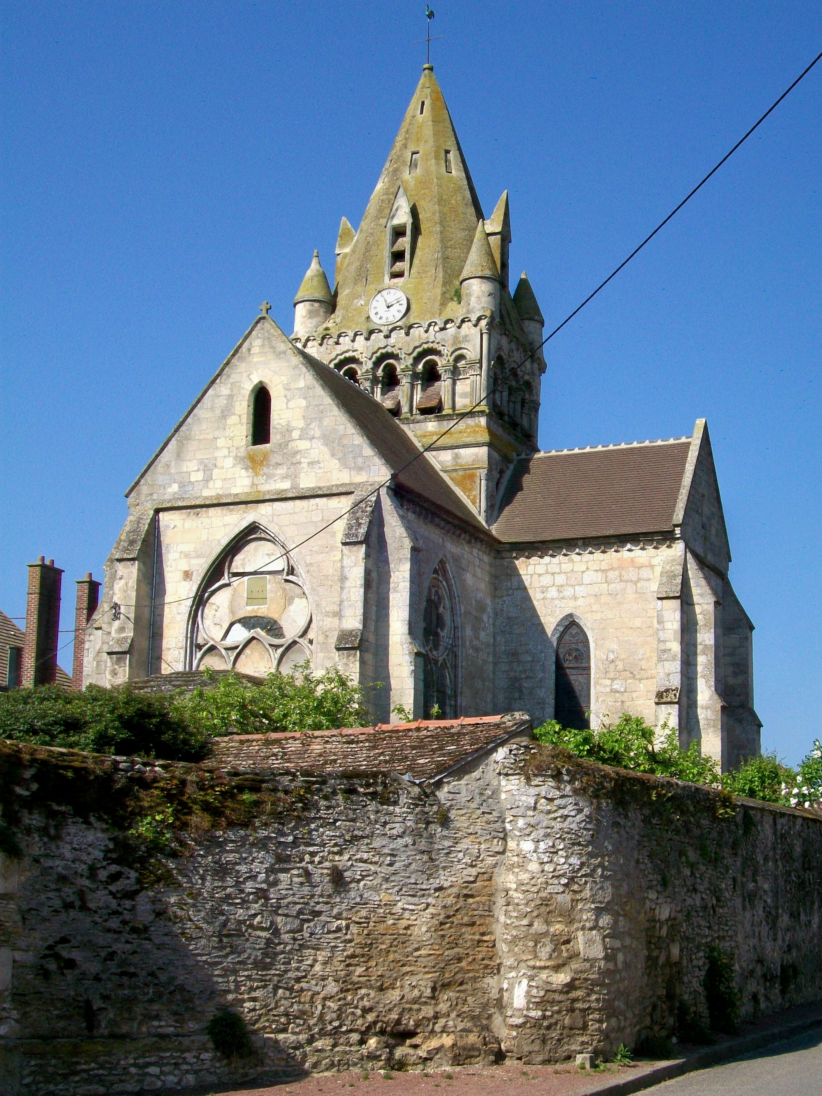 L'église de Rully avec son clocher roman, classée Monument historique, vue depuis l'est (rue de Conce).